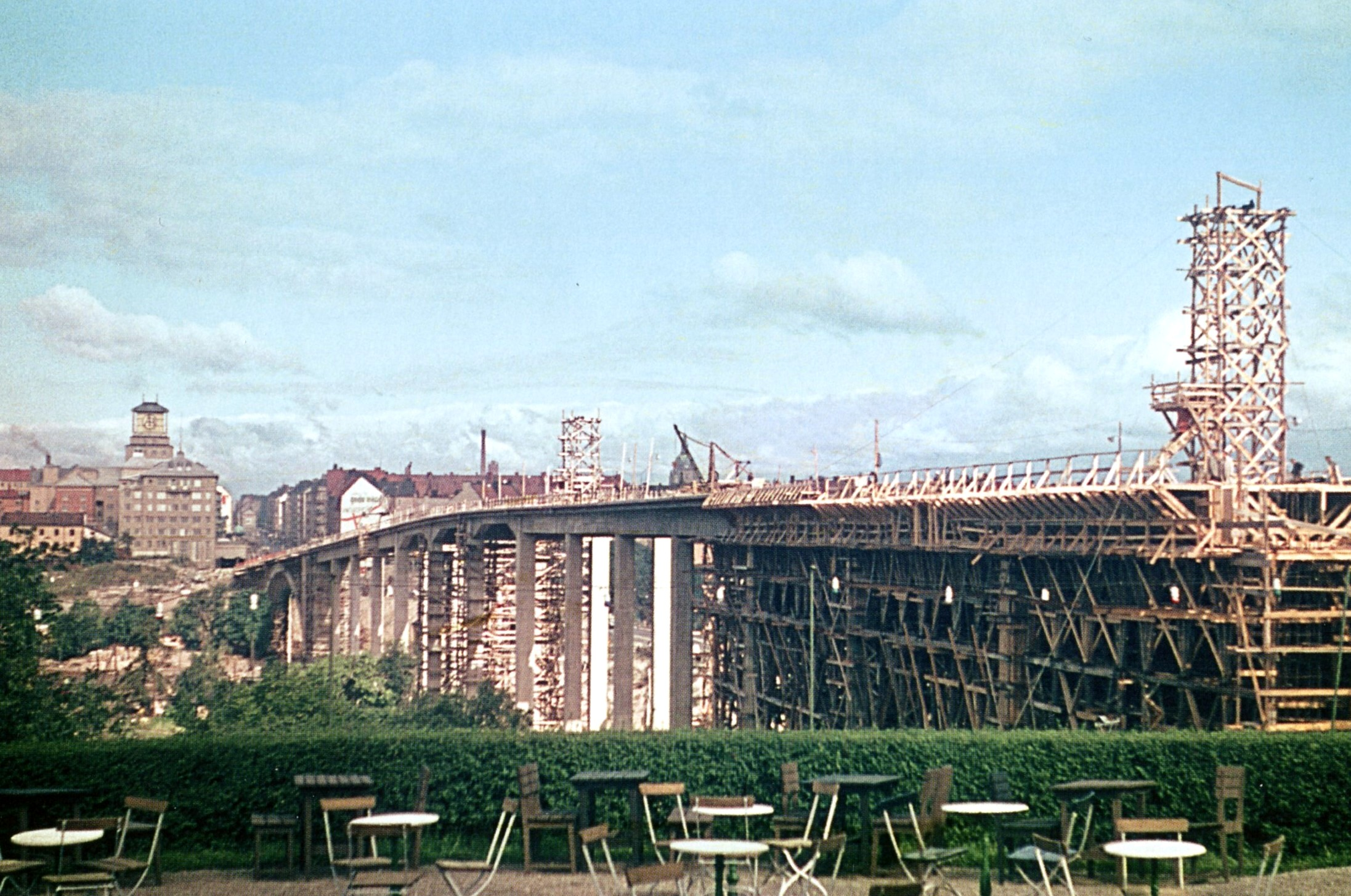 Skanstullsbron under uppförande, vy från Skanskvarns servering